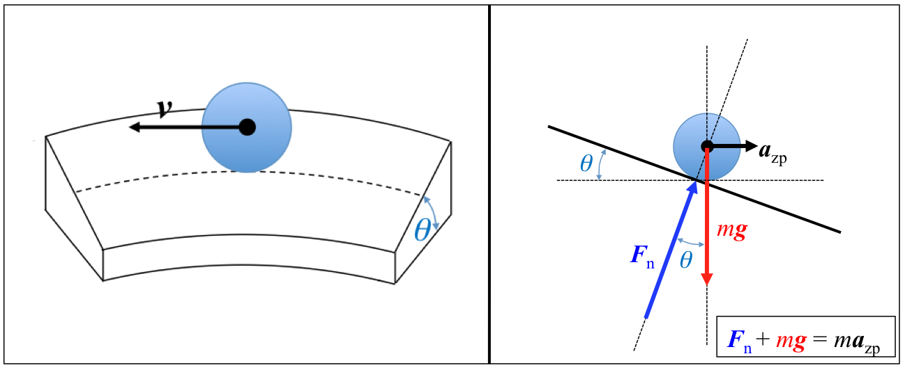 Marruskadurari gabeko peralte batean eragiten duten indarren eskema.